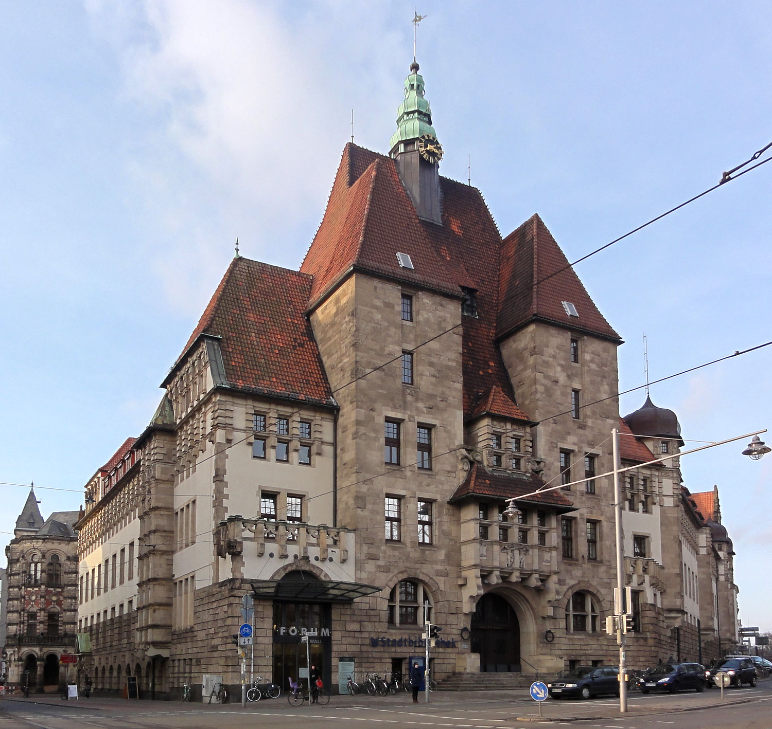 Polizeihaus Bremen, Am Wall 201. Erbaut: 1906–1908. Architekt: Carl Börnstein Das abgebildete Objekt ist ein geschütztes Kulturdenkmal in der Freien Hansestadt Bremen, mit der Nr. 0083 beim Landesamt für Denkmalpflege registriert.